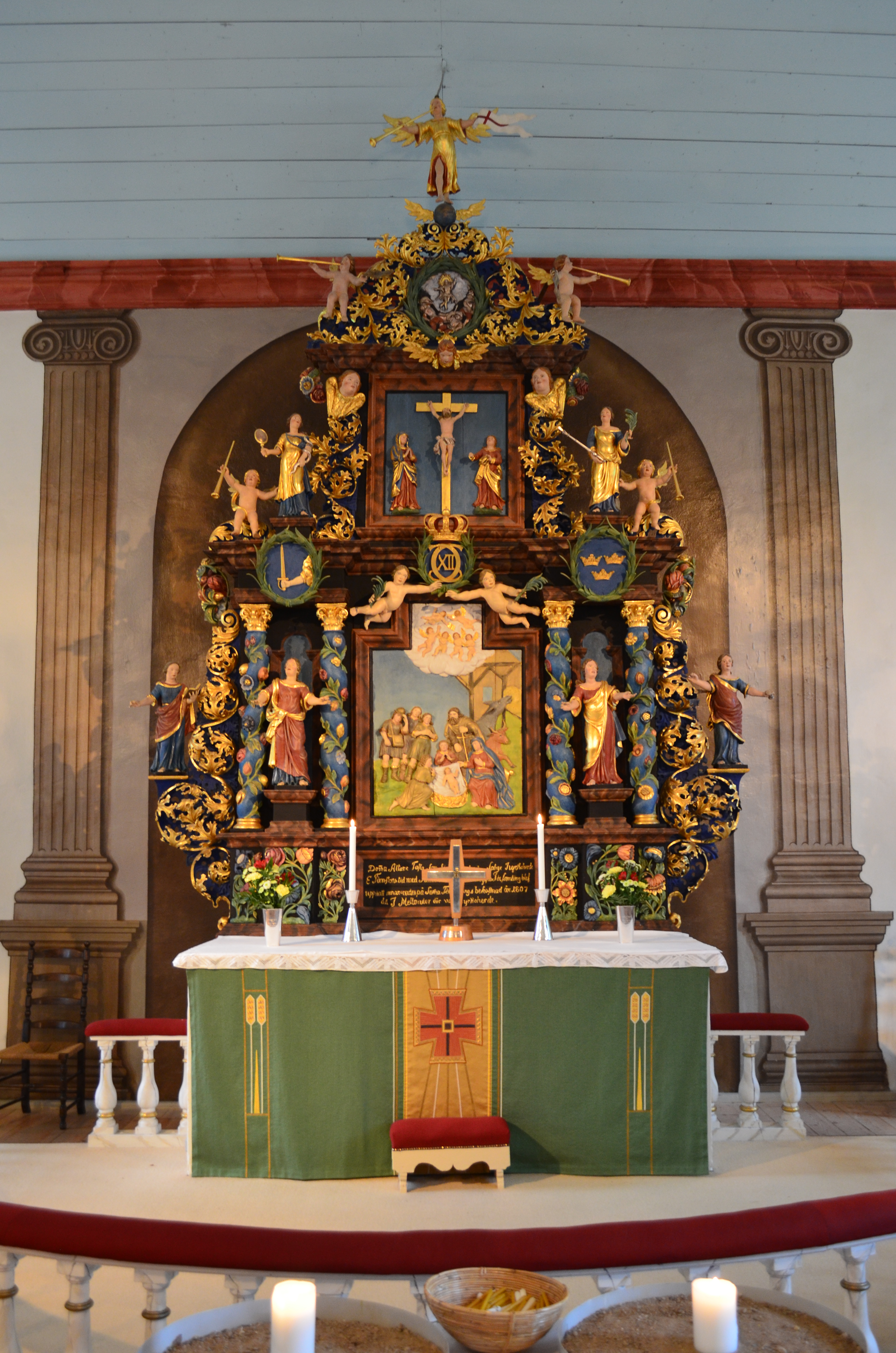 Altaruppsats i barockstil som är snidad 1704 av Anders Ekeberg i Borås och målad 1710 av Sven Wernberg. - Motiv i tre nivåer skildrar Jesu födelse, Golgata samt Himmelsfärden. - Altartavlan är inramad med basunänglar och kvinnofigurer. - Dessutom finns Karl XII:s namnchiffer, svärdet och riksvapnet.